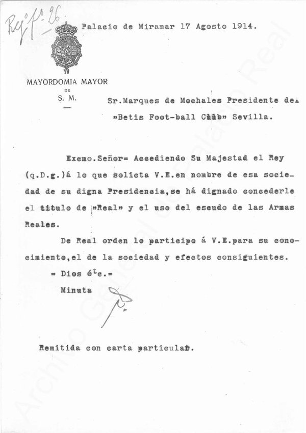 Misiva que concedió SM al Real Betis en 1914. Título de Real